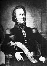 Gustaf Wilhelm af Tibell, born 1772, died 1832